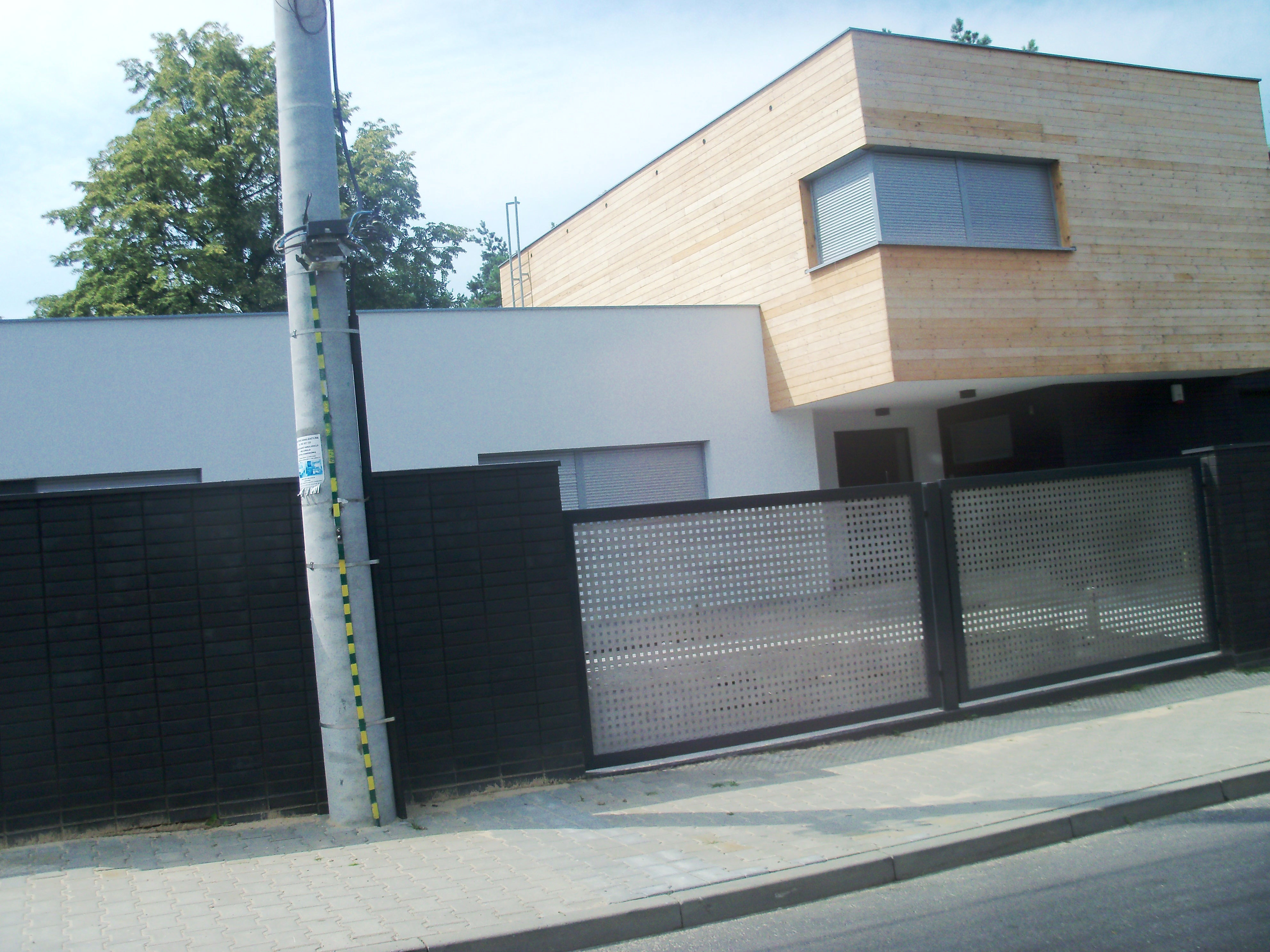 Ulica Różyckiego w Będzinie-Grodźcu (Boleradz)